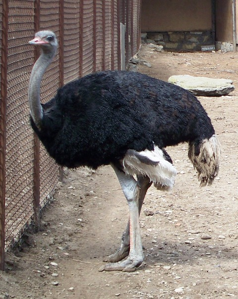 страус в бакинском зоопарке